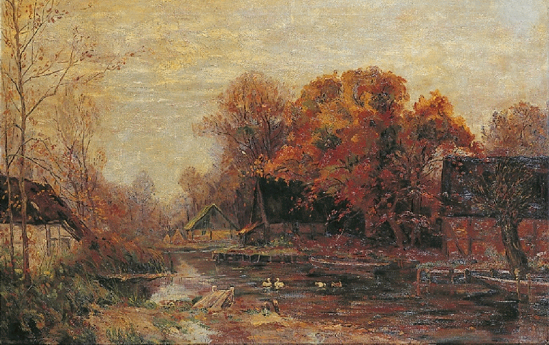 Herbst im Spreewald, Öl auf Leinwand, 62×96 cm, unten links signiert